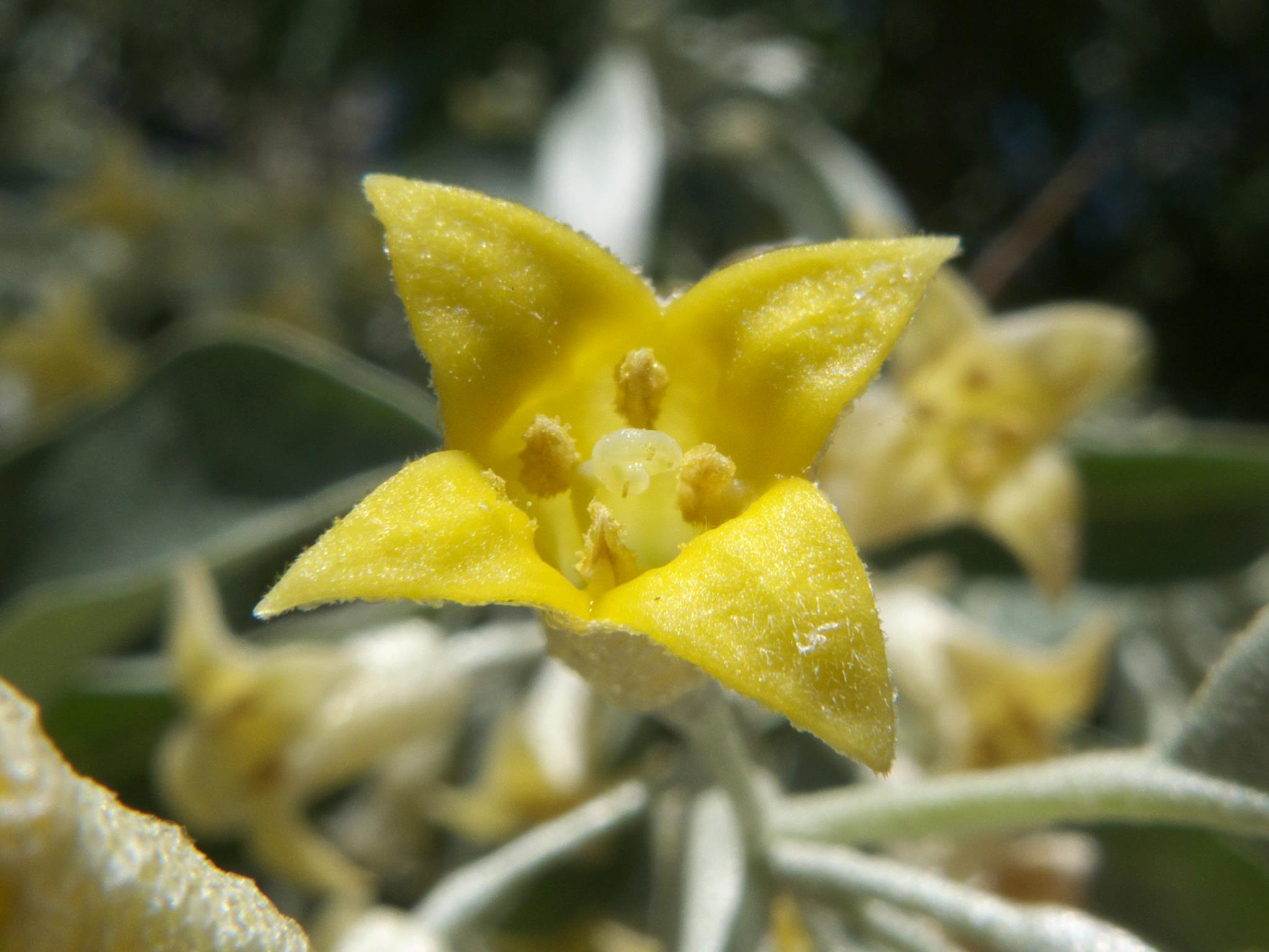 Flor de Elaeagnus angustifolia (Elaeagnaceae). Barrio de Moratalaz, Madrid.